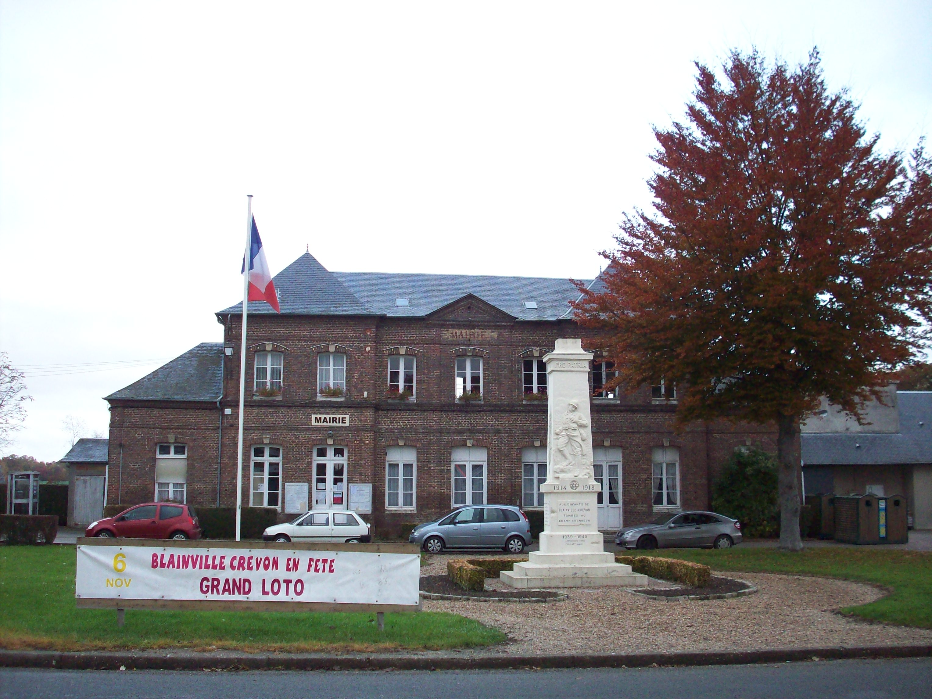 Mairie de Blainville-Crevon.